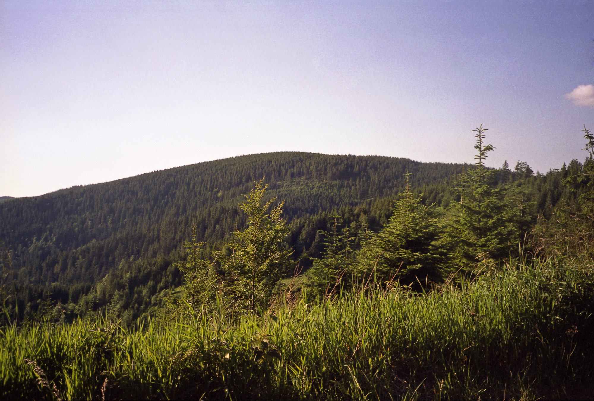 Radziejowa widziana z Małego Rogacza.